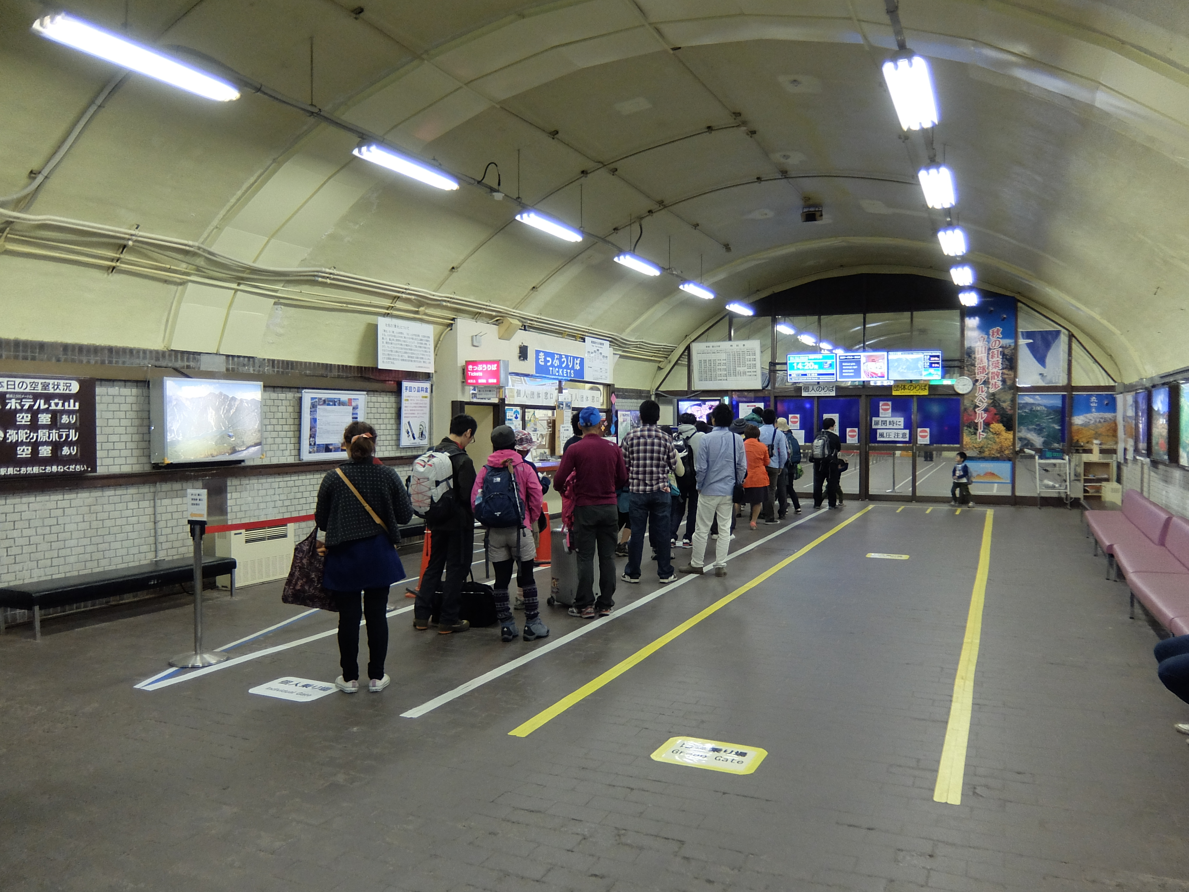 黒部湖駅の様子